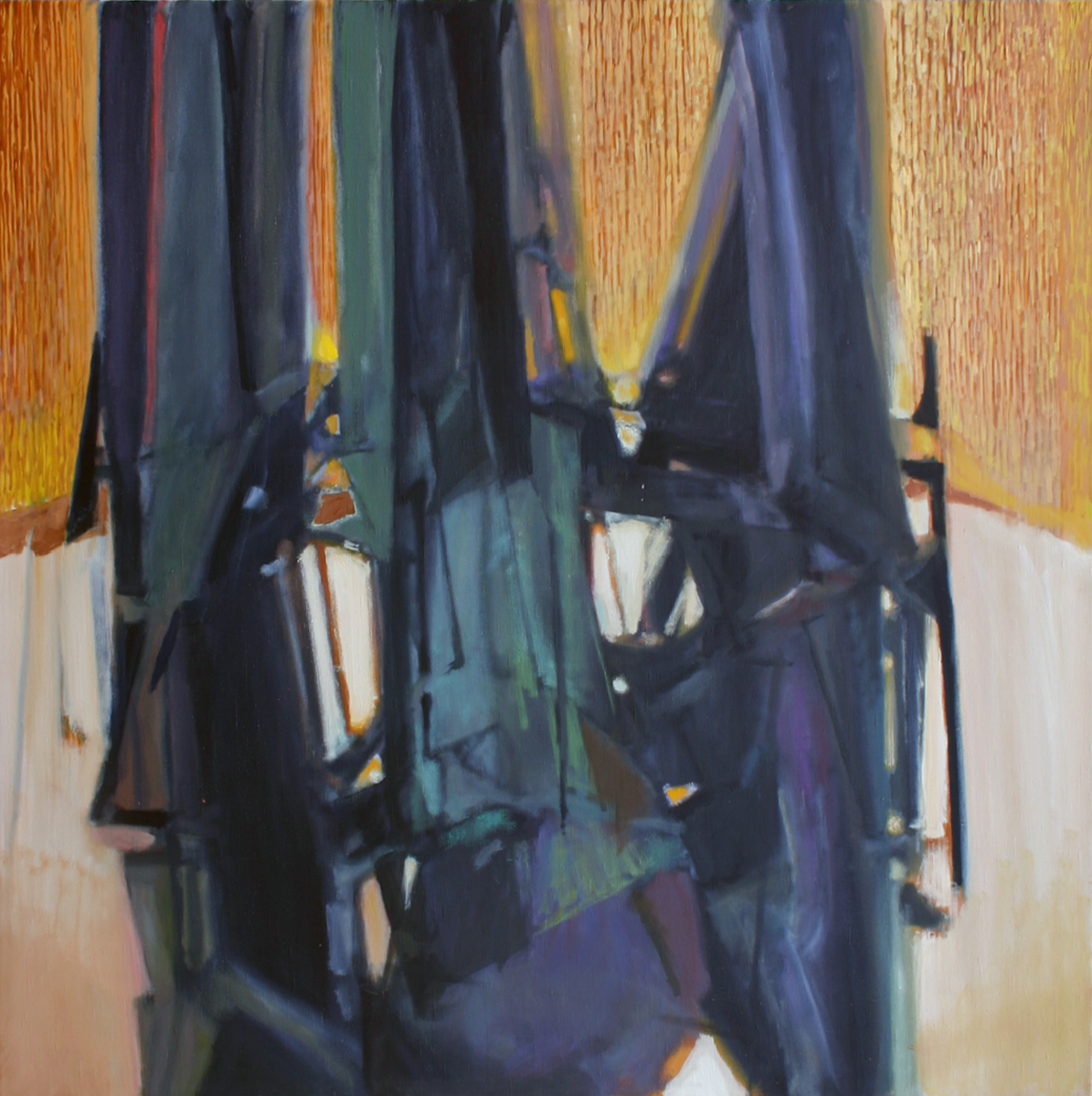 Miroslav Štolfa, Tři grácie, olej, plátno, 140 x 140 cm, 2012